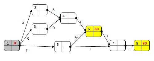 PERT-sivun kuvitusta, verkko 1.